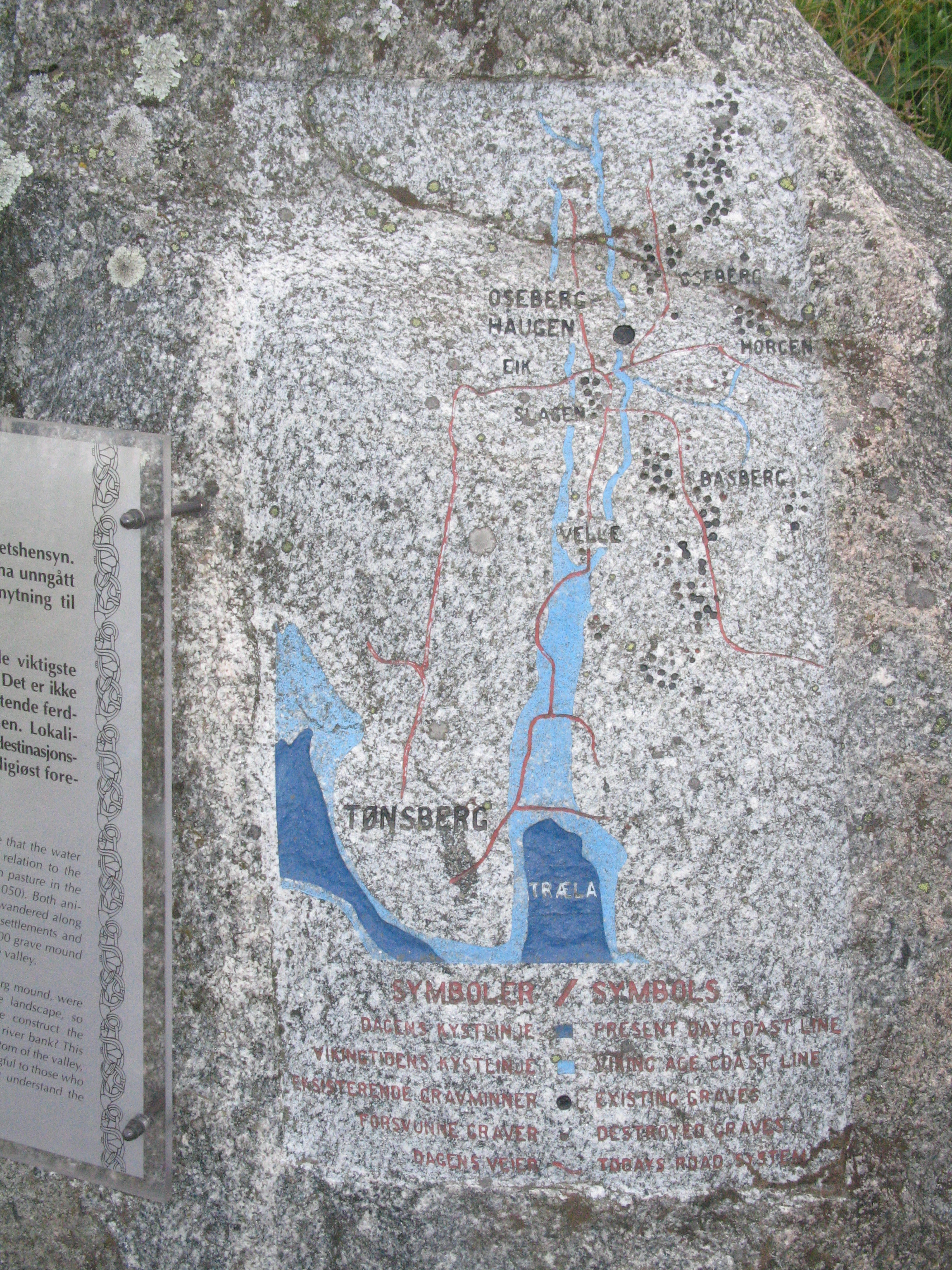 Slagendalen - kart hugget i stein